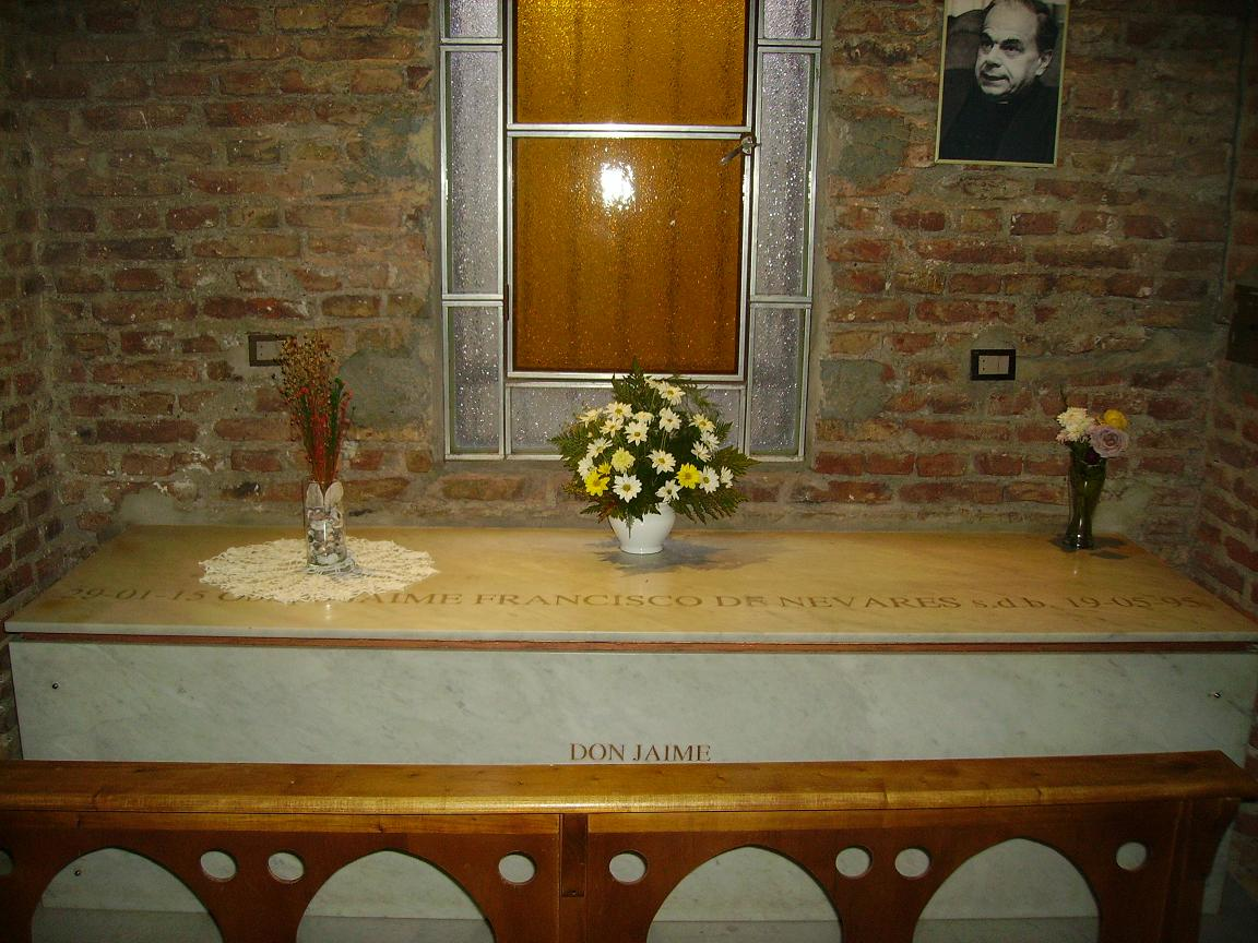 Oratorio frente a la tumba de Mons. jaime de Nevares